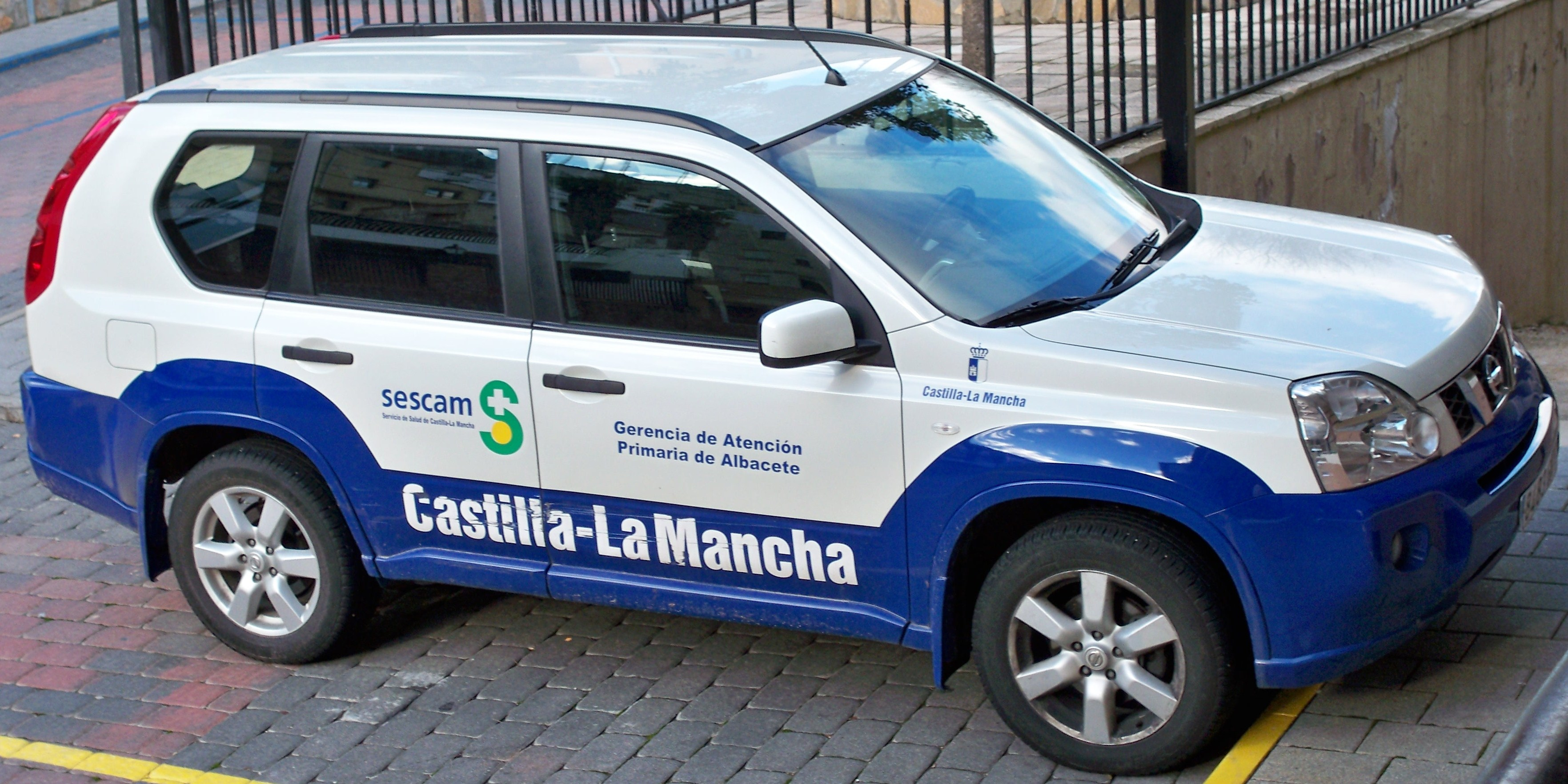 Vehículo del Servicio de Salud de Castilla-La Mancha adaptado a la alta montaña que presta su servicio en Molinicos (Albacete)